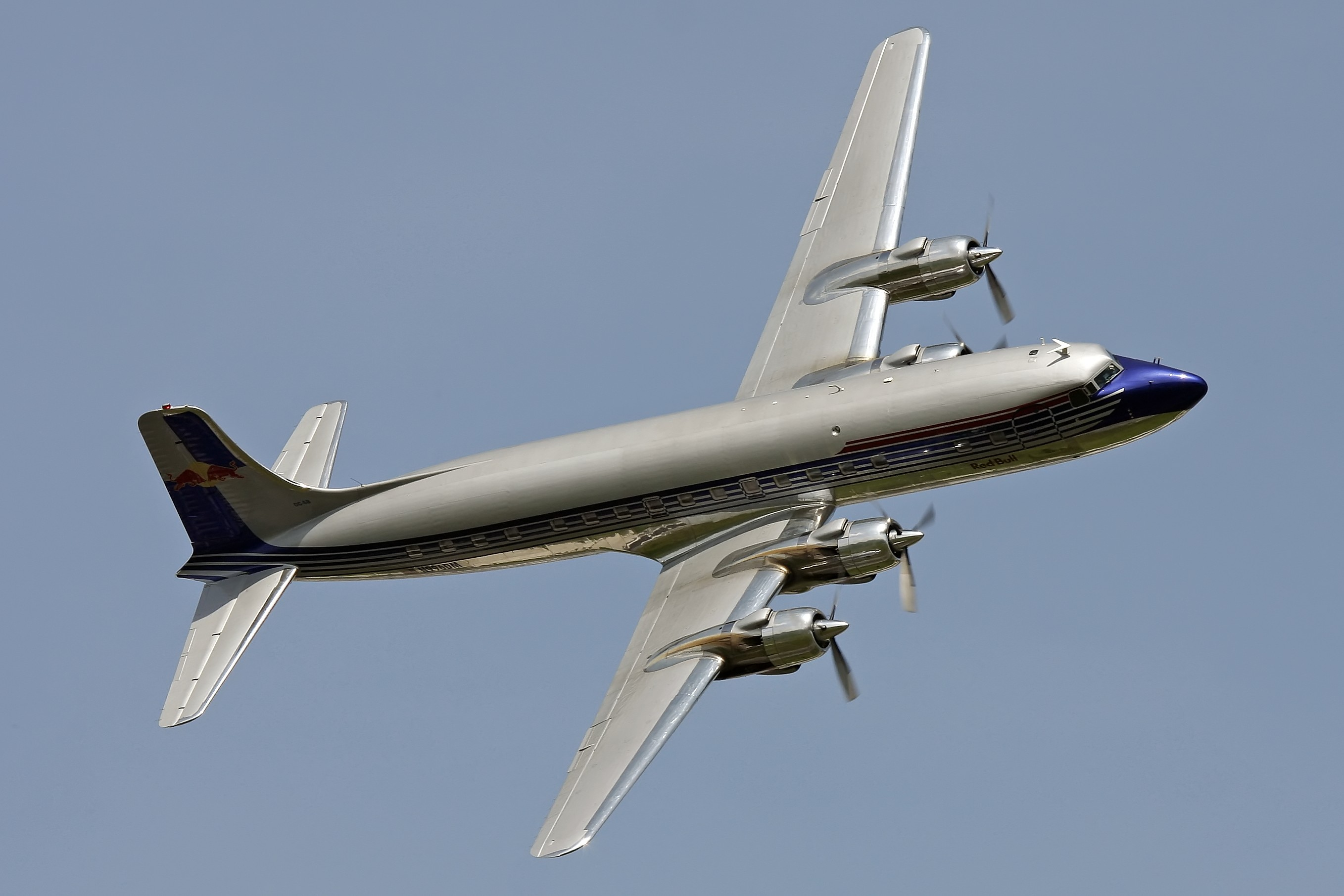 BRE 10-05-09